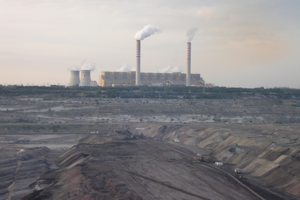 Kopalnia i elektrownia Bełchatów